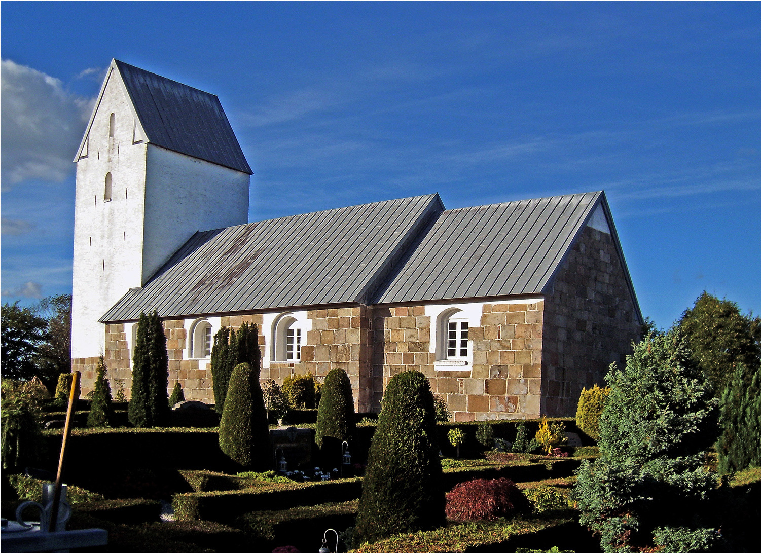 fra sydøst